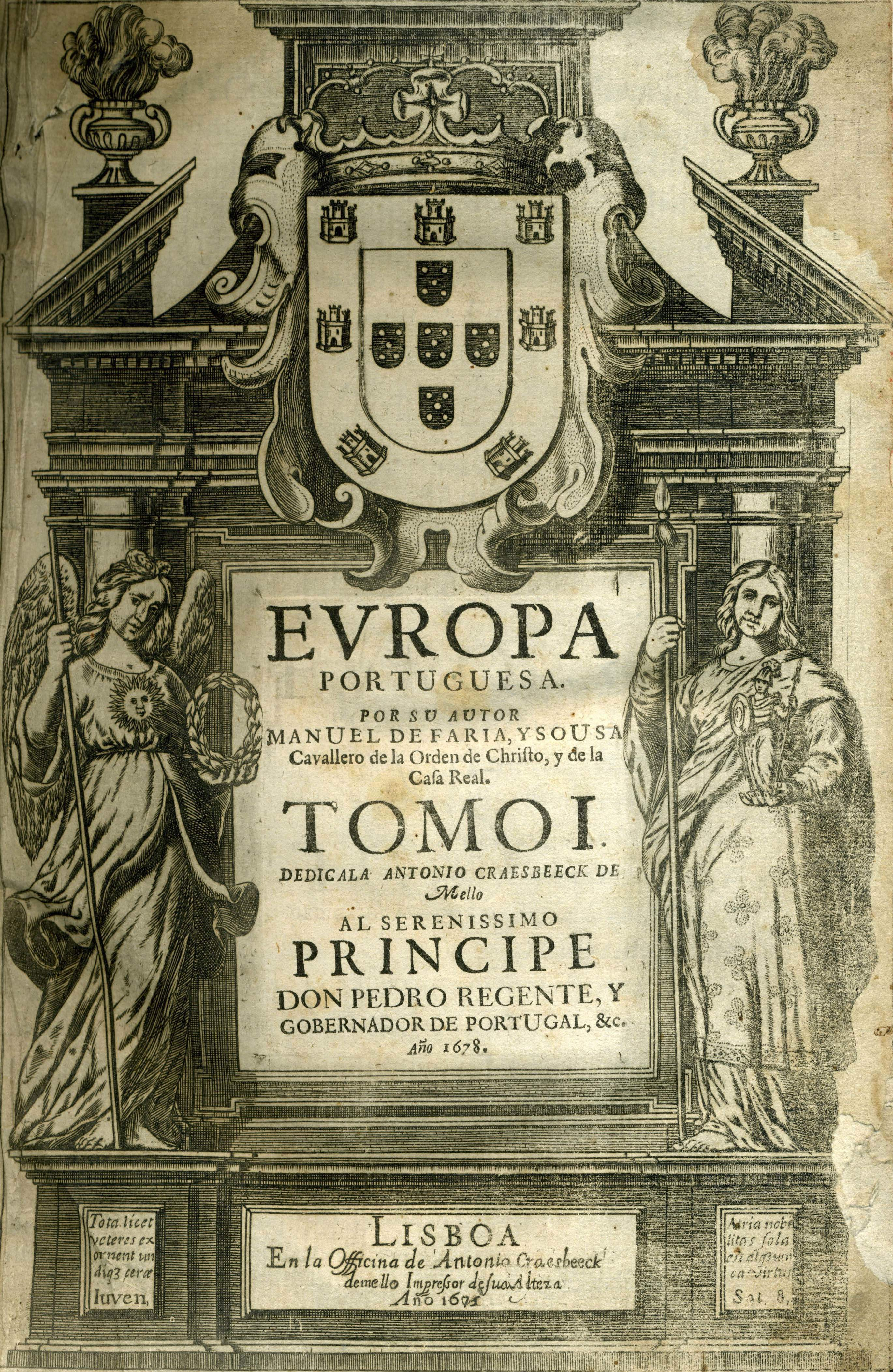 frontispice d'"Europa portuguesa" de Manuel de Faria e Sousa, 1678